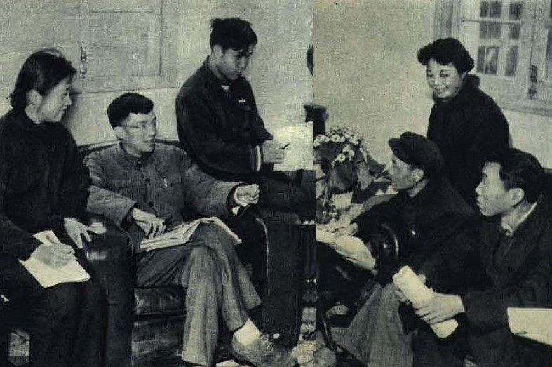 1962-07 1962年 左二为百花奖最佳导演谢晋《红色娘子军》